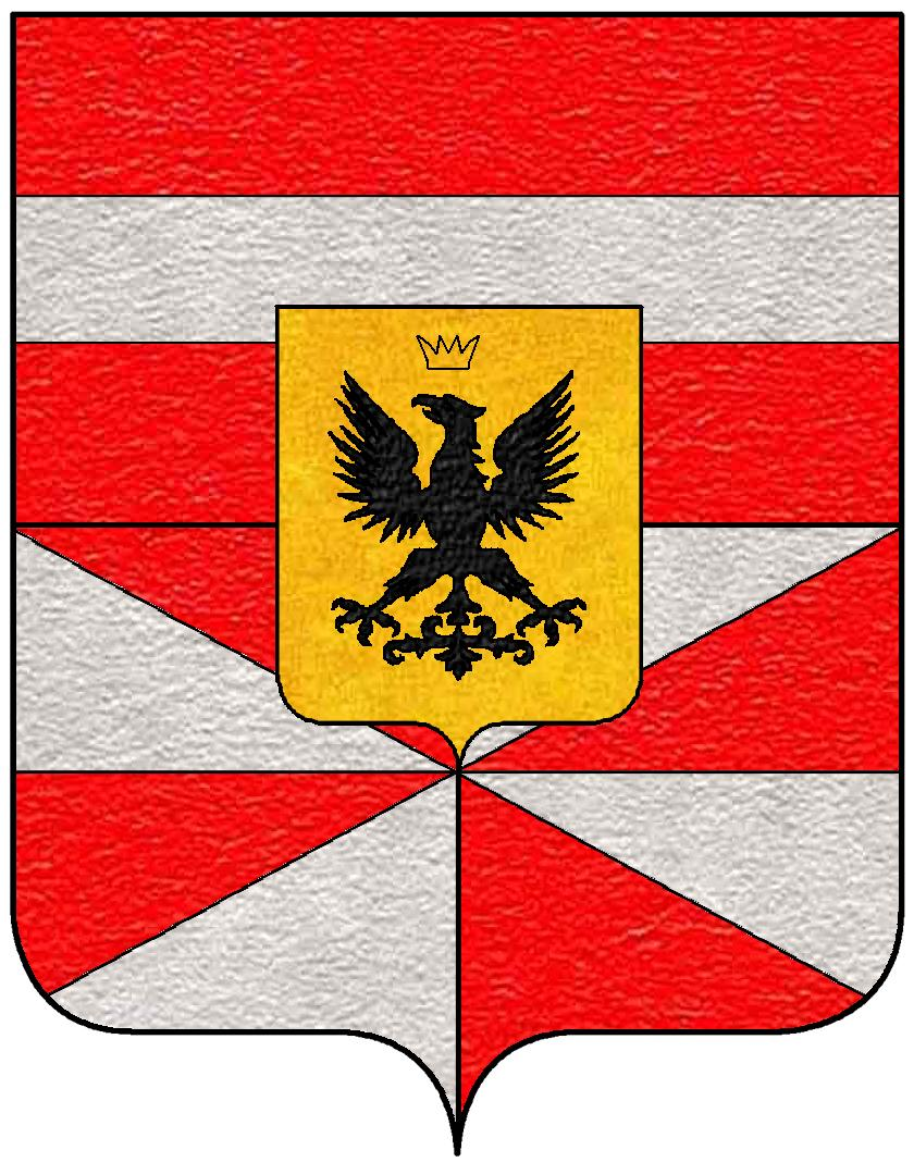 Stemma della famiglia De Sterlich